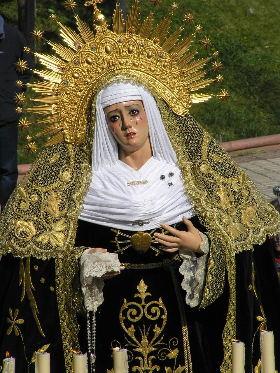 Procesión de María Santísima en su Soledad